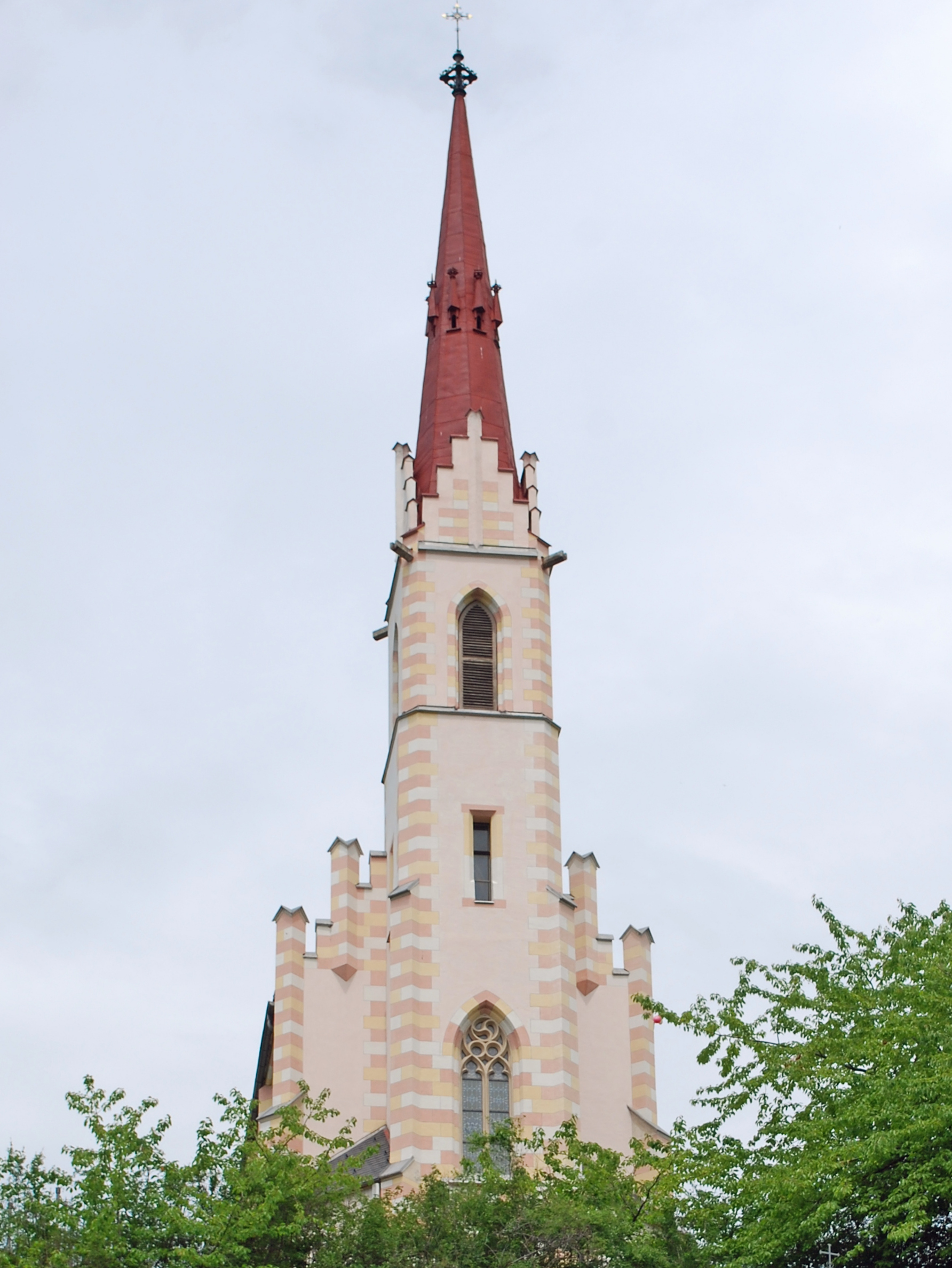 Ursprungskapelle vor der Wallfahrtskirche Maria Hilf am Locherboden, crop